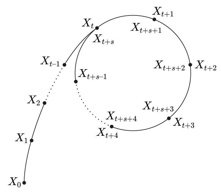 צורת האות היוונית רו של מיפוי אקראי